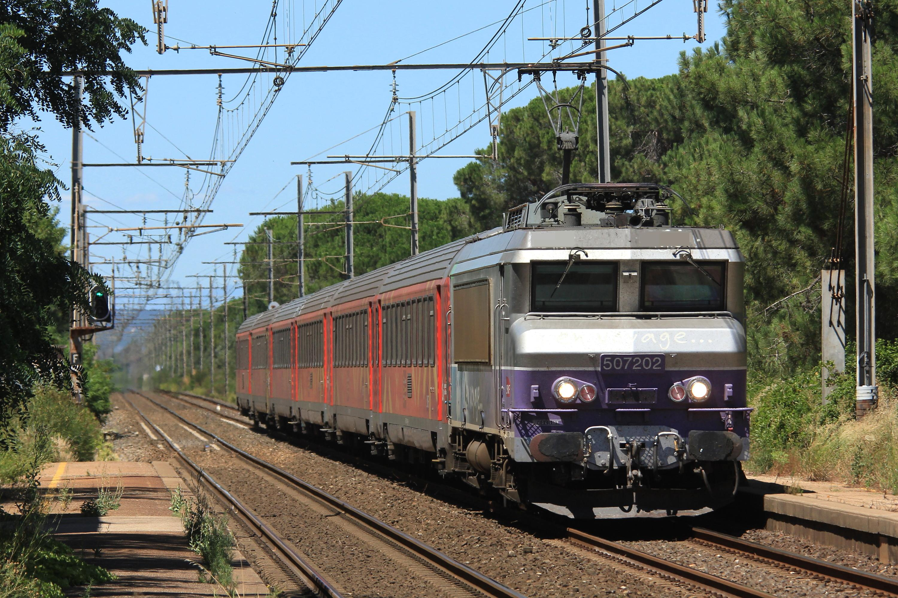 La BB 7202 en livrée « En voyage », tirant 6 voitures Corail Languedoc-Rousillon, assure le TER n° 876414 (Perpignan - Avignon) et passe sans arrêt en gare de Jonquières-Saint-Vincent.